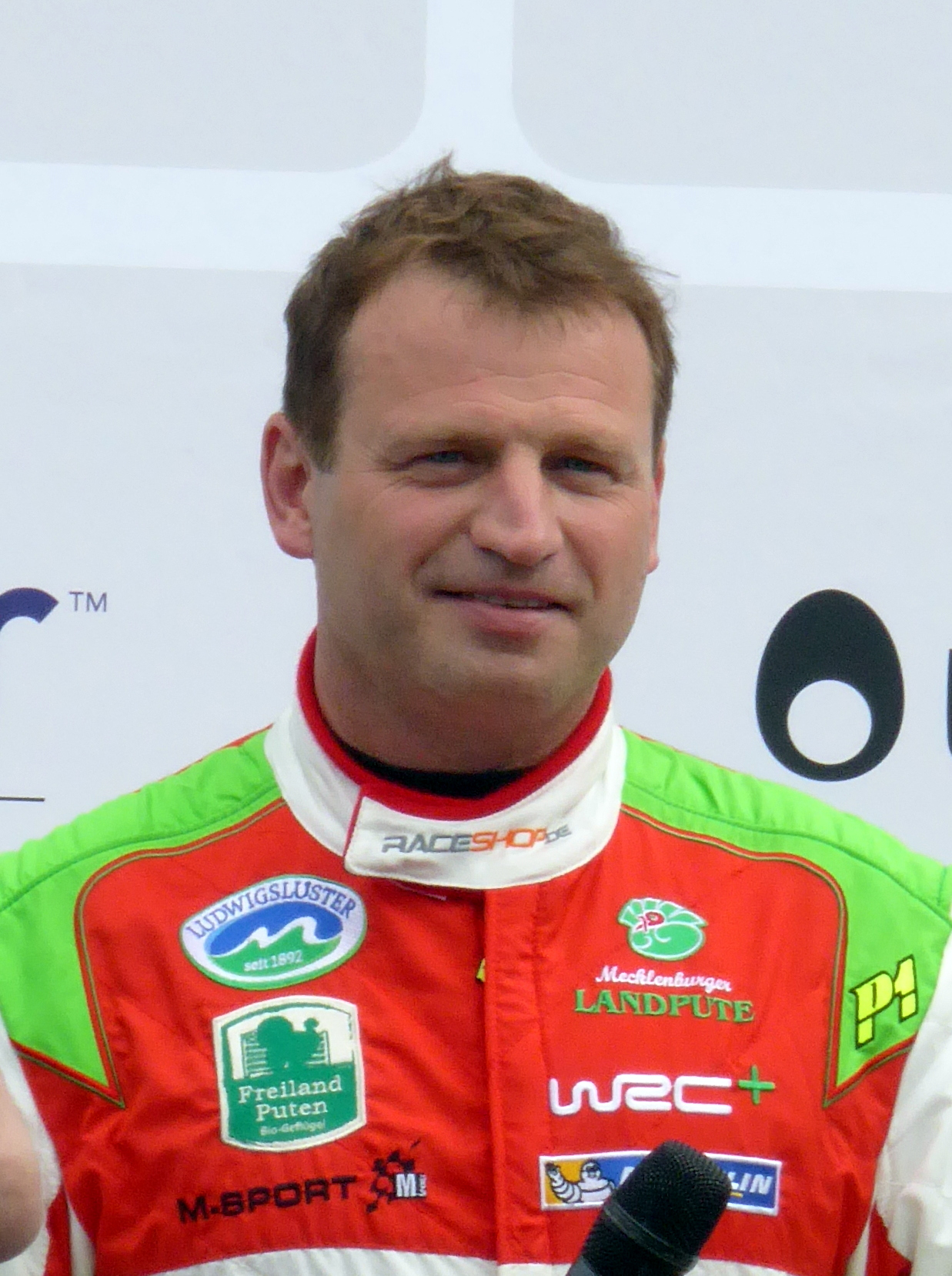 Rallye Deutschland 2017, Eröffnungszeremonie auf dem Tbilisser Platz in Saarbrücken